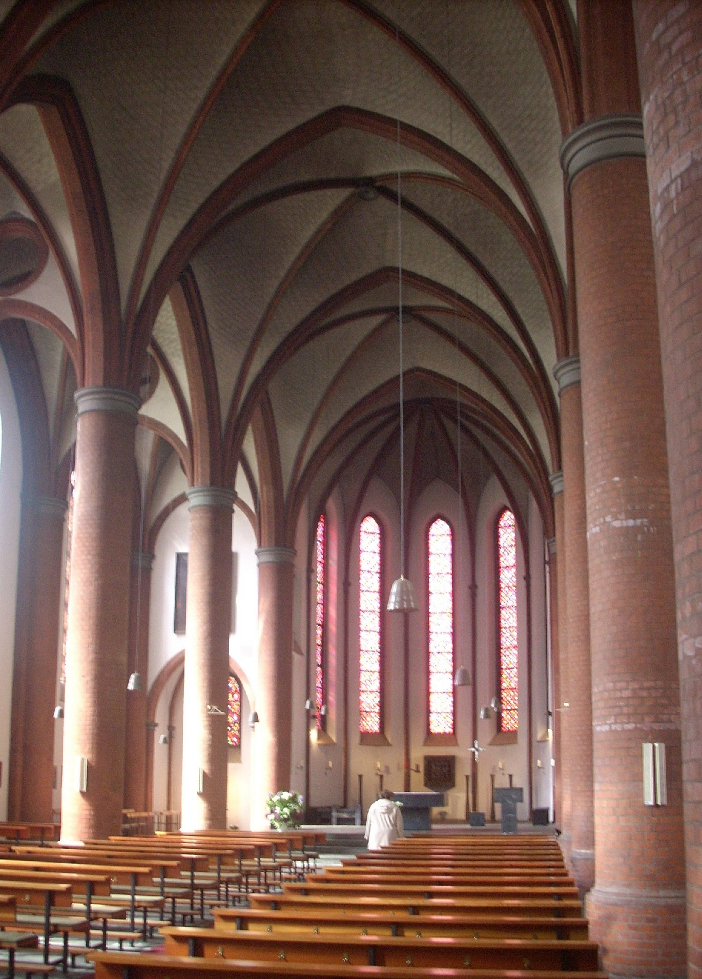 Lübeck, Kath. Propsteikirche Herz Jesu, Inneres